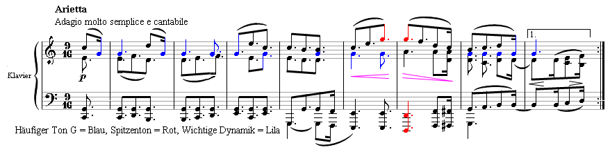 Takte 1-8 des Arietta-Themas des zweiten Satzes aus Beethovens Klaviersonate op. 111